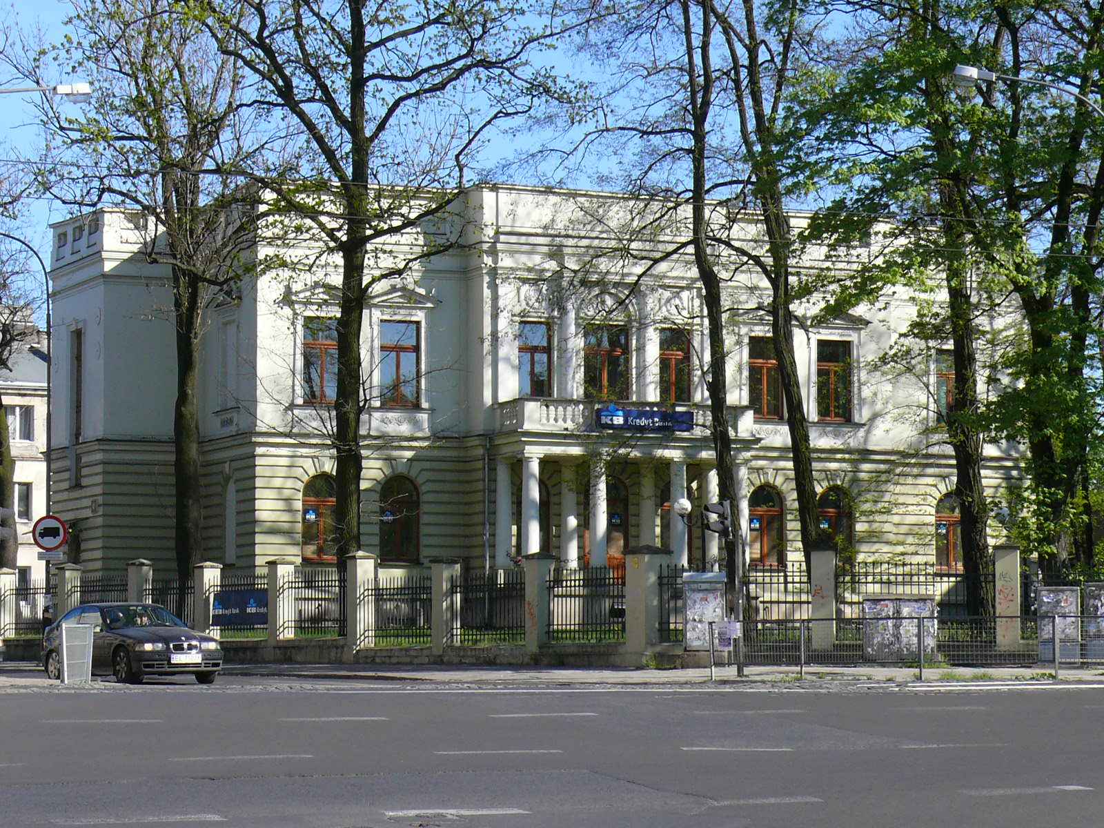 Pałacyk ul. Bednarska 42 w Łodzi